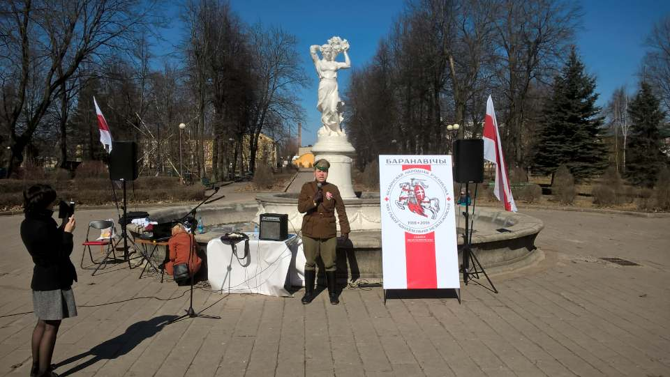 Беларуская (тарашкевіца): Сьвяточныя мерапрыемства на Дзень Волі ў Баранавічах, 100 год БНР, 25-03-2018 Выступае Ігра Мельнікаў у форме вайскоўца БНР